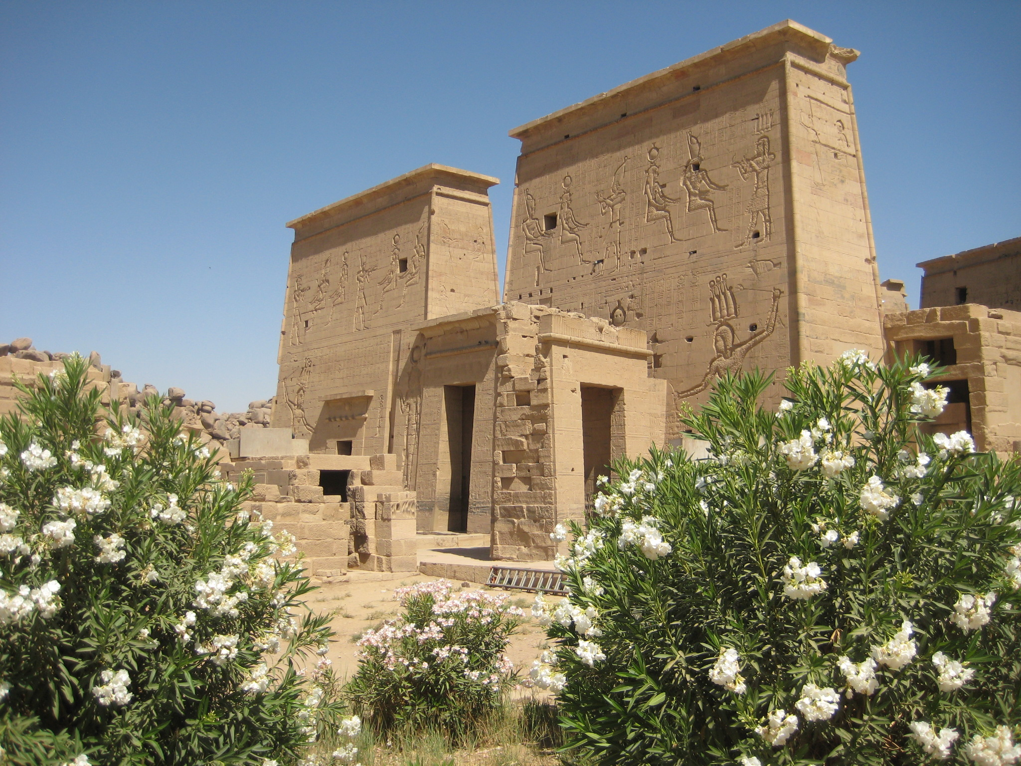 Insel Philae, Assuan, Ägypten